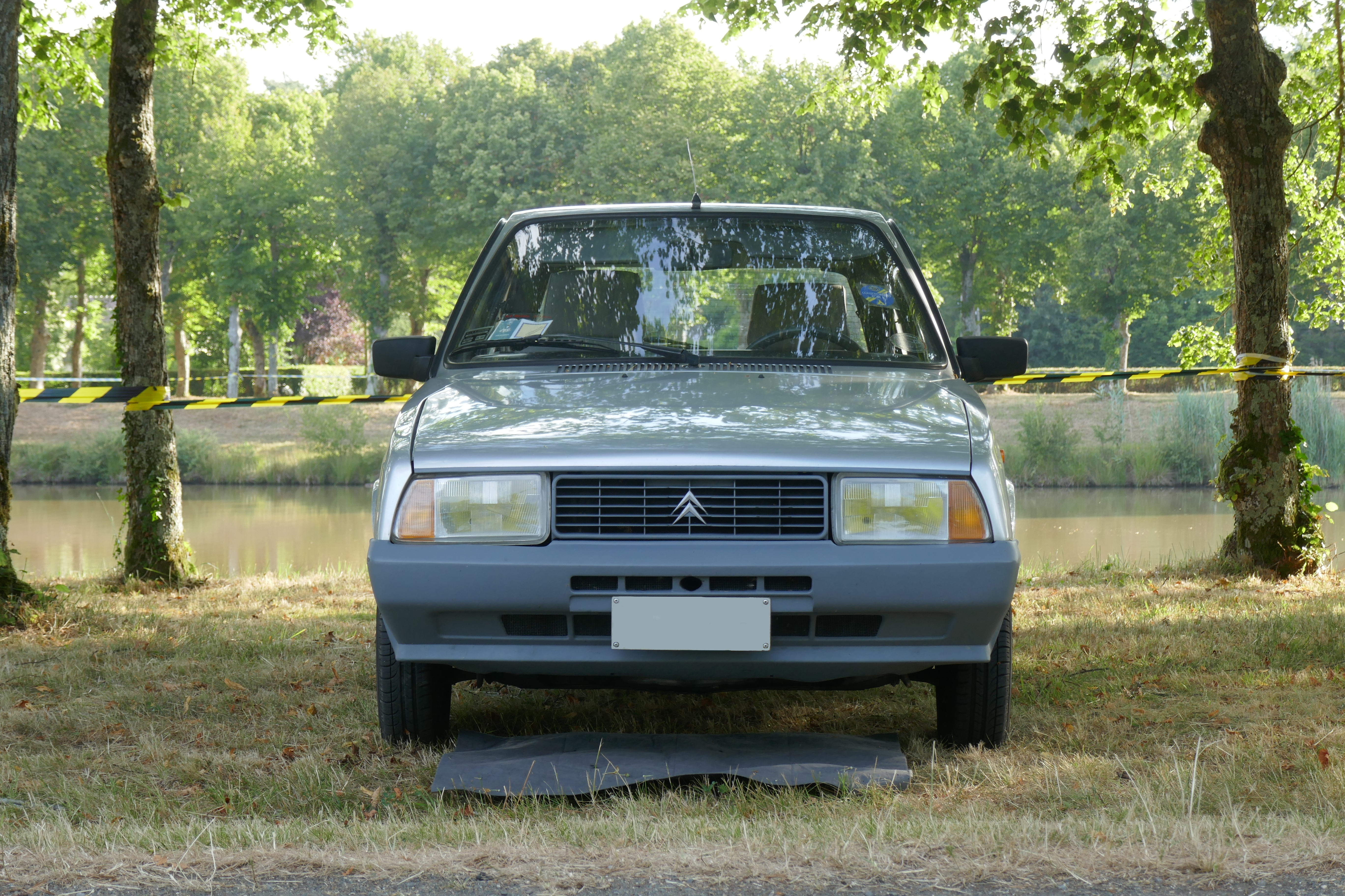 Axel 11 R italienne de 1986 au Centenaire Citroën